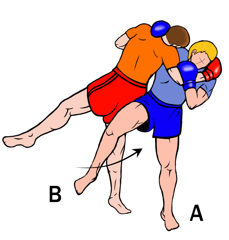 Fauchage de jambe en boxe birmane